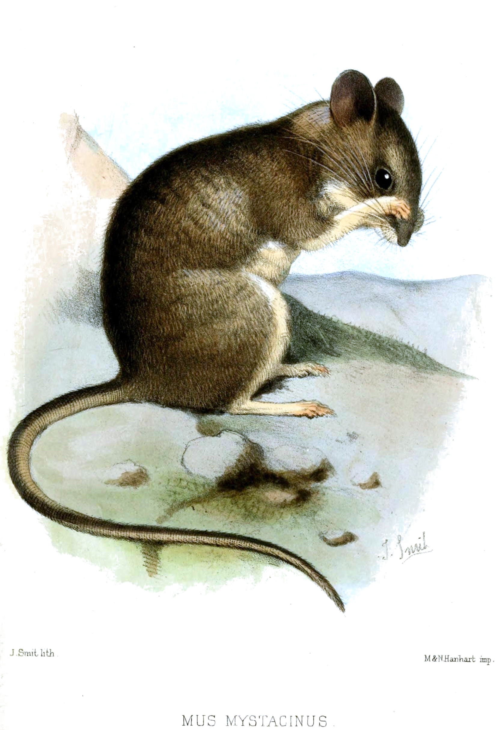 Mus mystacinus = Apodemus mystacinus